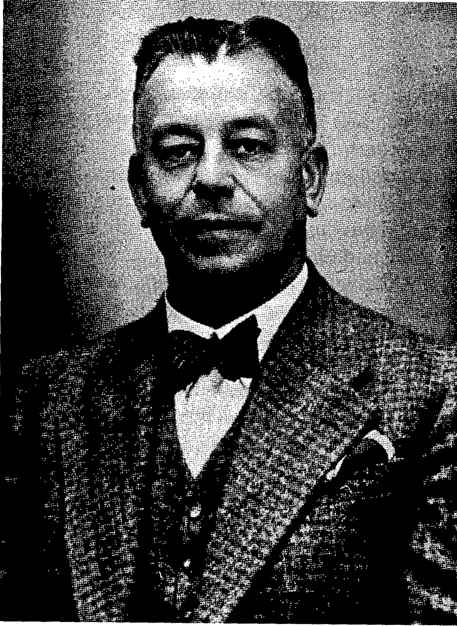 Dr. jur. Friedrich Nachtsheim (1888 bis 1965) war von 1923 bis 1934 Bürgermeister in Werl.